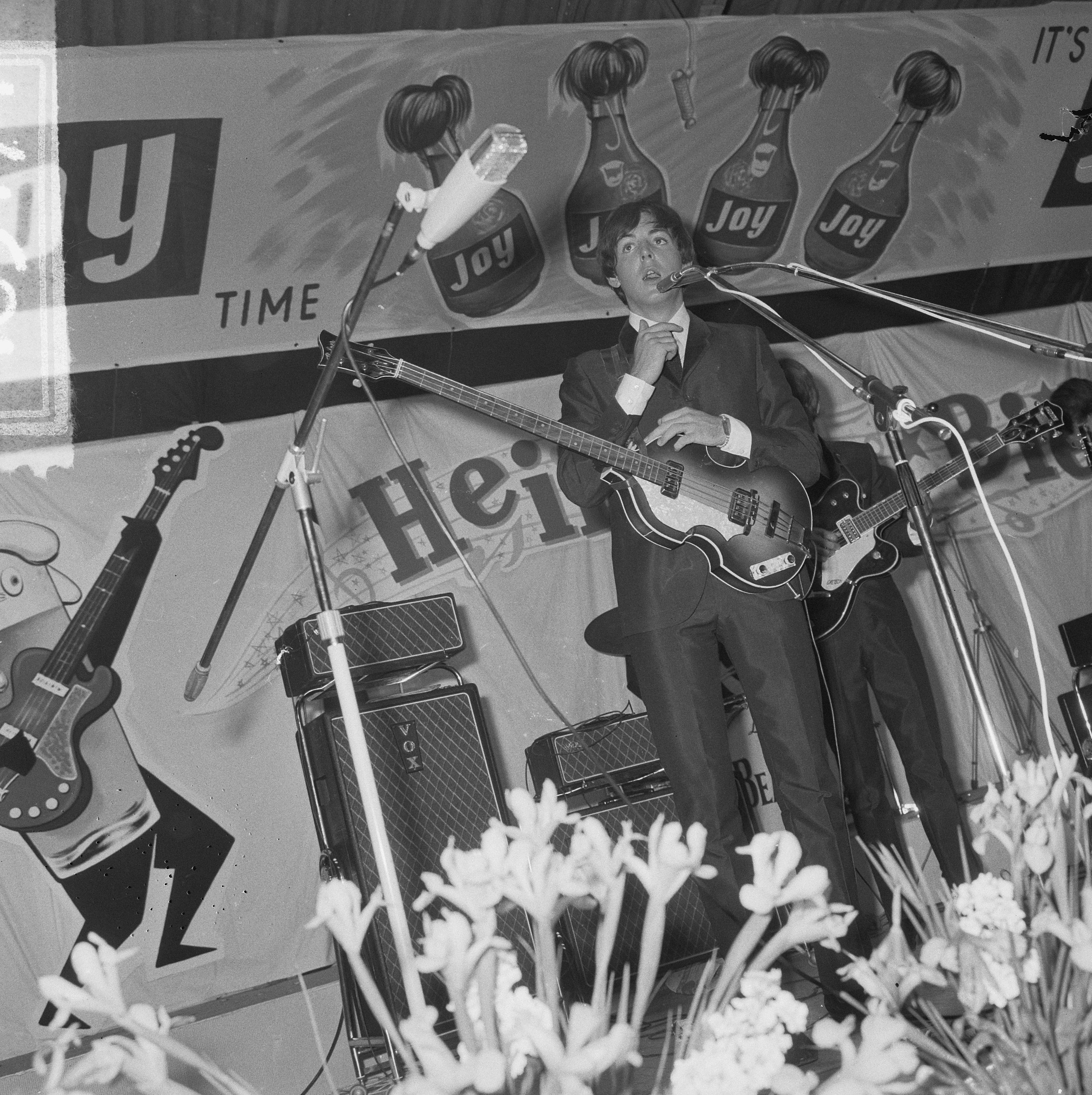 Collectie / Archief : Fotocollectie Anefo Reportage / Serie : [ onbekend ] Beschrijving : Beatles in ons land, hun optreden in de veilingshal te Blokker, de Beatles tijdens optreden Datum : 7 juni 1964 Locatie : Blokker Trefwoorden : Optredens, veilinghallen Instellingsnaam : Beatles Fotograaf : Nijs, Jac. de / Anefo Auteursrechthebbende : Nationaal Archief Materiaalsoort : Negatief (zwart/wit) Nummer archiefinventaris : bekijk toegang 2.24.01.03 Bestanddeelnummer : 916-5174